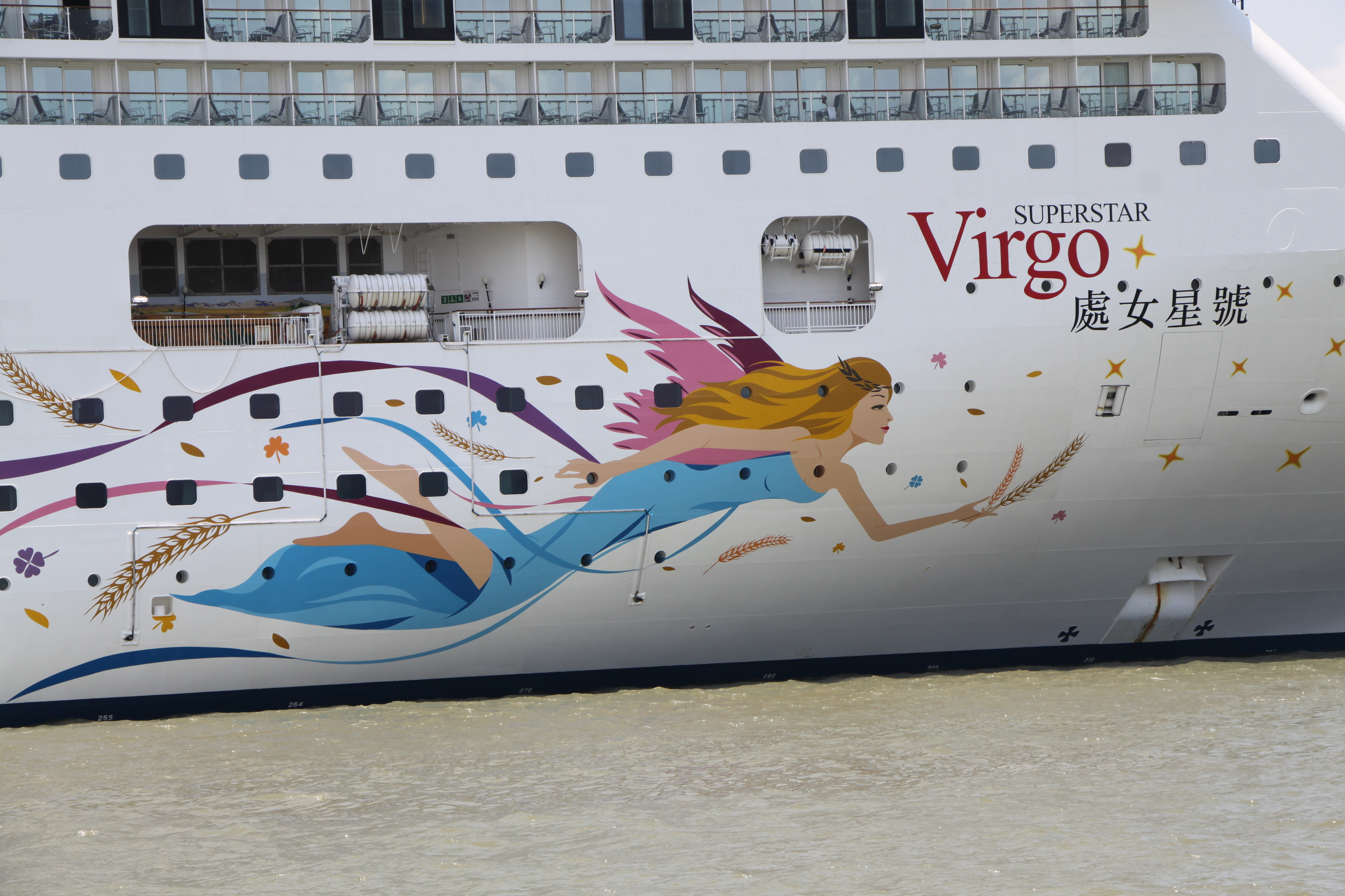 处女星号LOGO